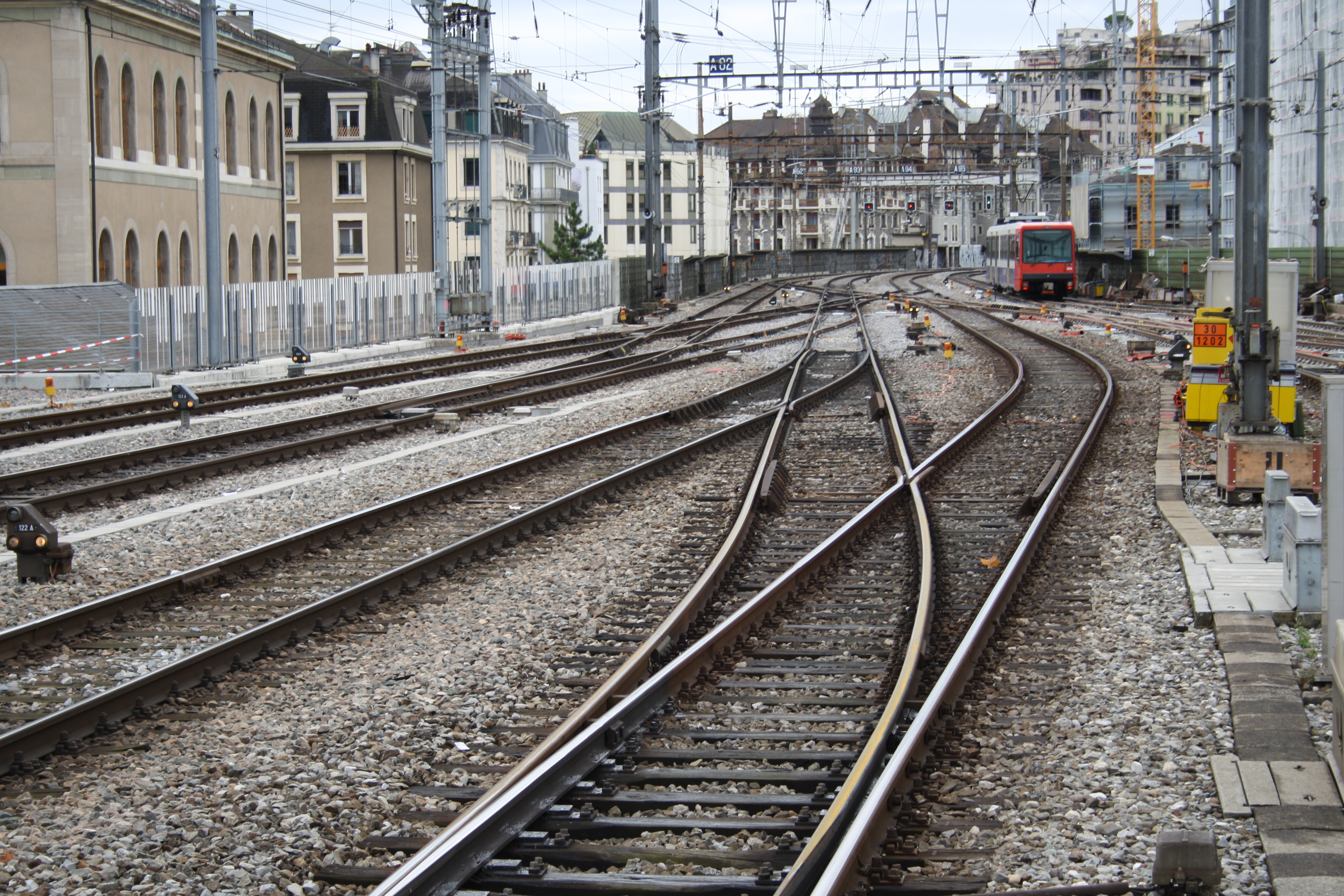 Südliche Bahnhofsausfahrt Genève-Cornavin